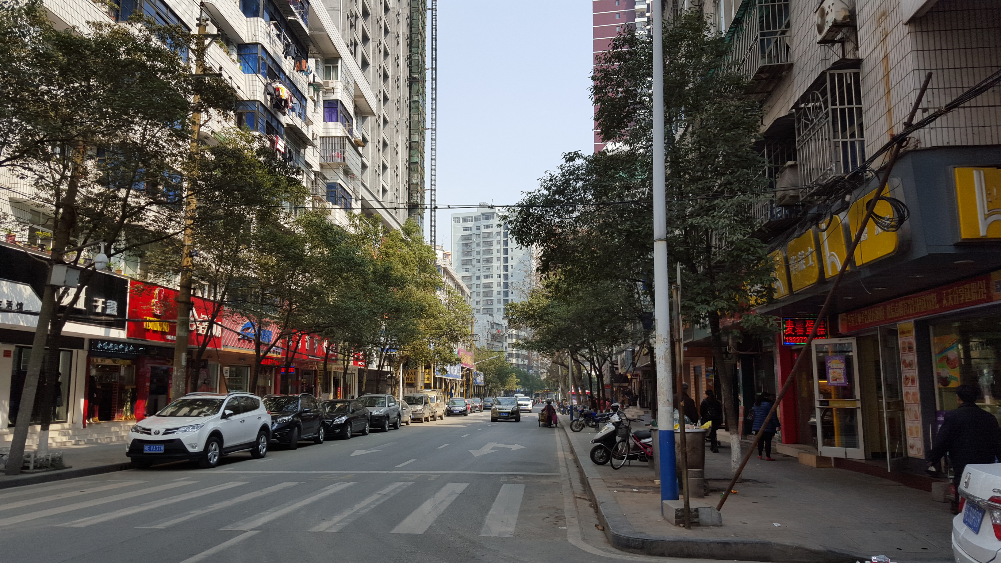 长阳土家族自治县龙舟大道